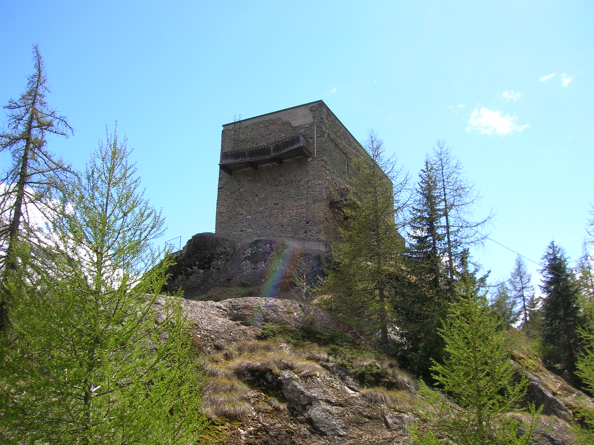 Casaforte di Planaval, Planaval, Arvier, Valle d'Aosta, Italia.